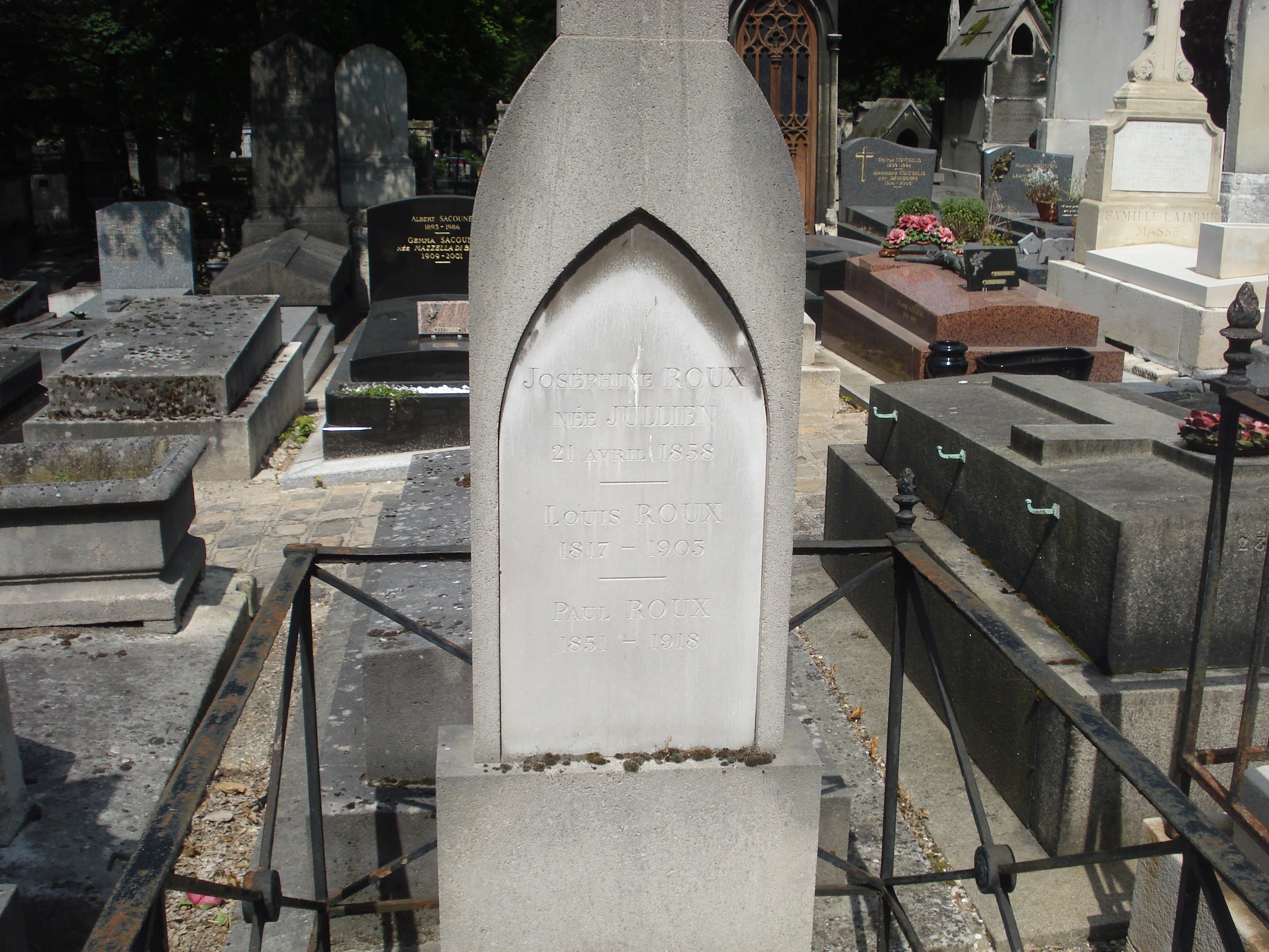 ROUX Paul-Louis-Joseph, (1851-1918), artiste peintre, graveur et aquarelliste, né le 8 septembre 1851 à Paris. ROUX Louis-François-Prosper, (1817-1903), artiste peintre de genre historique JULLIEN Françoise-Joséphine-Élisabeth, (xxxx-1858), épouse de Prosper-Louis Roux, le mariage est daté du 26 novembre 1850 sur le site des Archives de Paris 3e ancien, elle décède le 21 avril 1858. Cimetière de Montmartre - 10e division